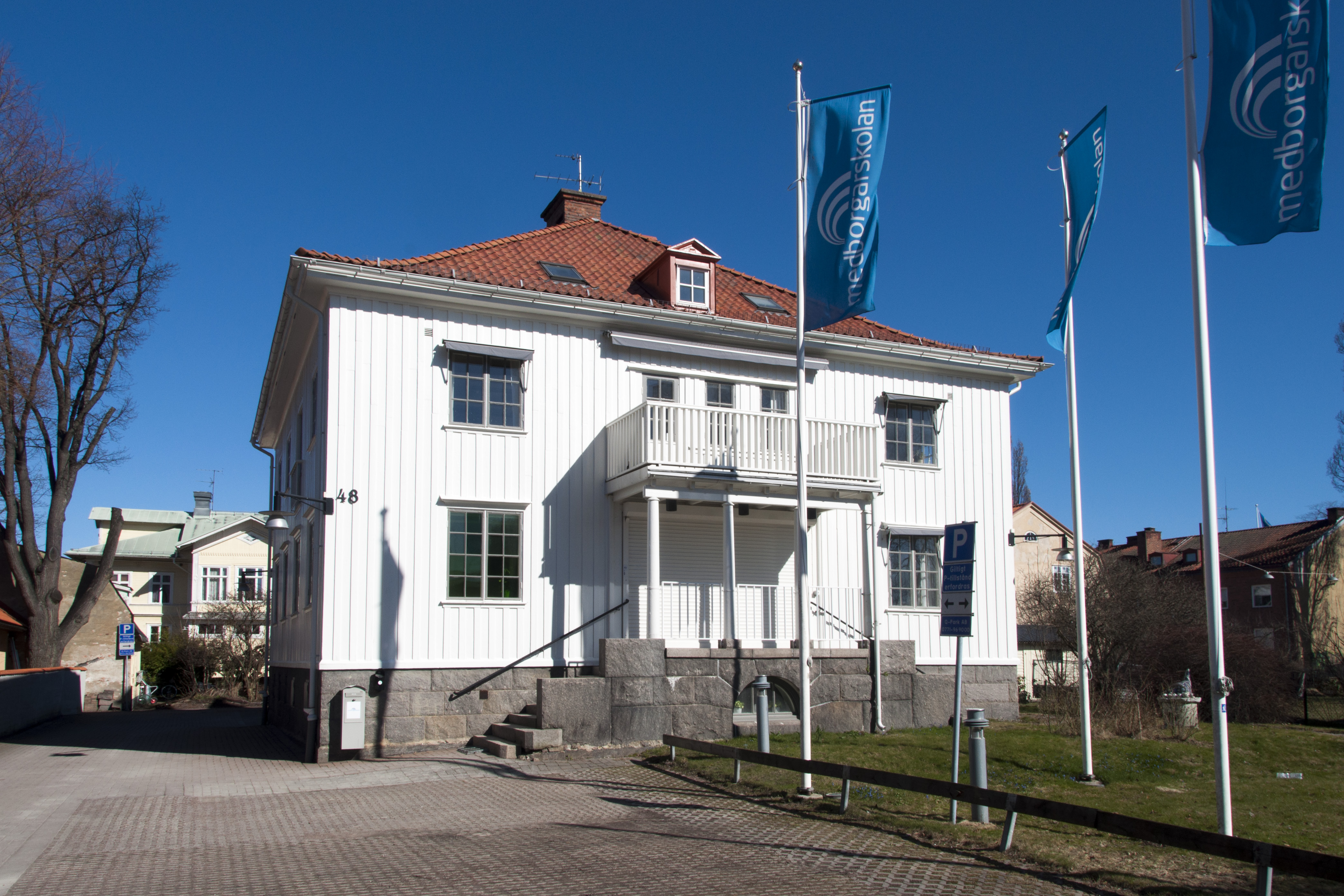 Laxen 9, Drottninggatan 48, Karlstad. Byggnadsår 1924. Ahnell & Karlgren arkitekter (Karlgren, Erik Gillis & Ahnell, Karl Arvid. Idag MEdborgarskolan)